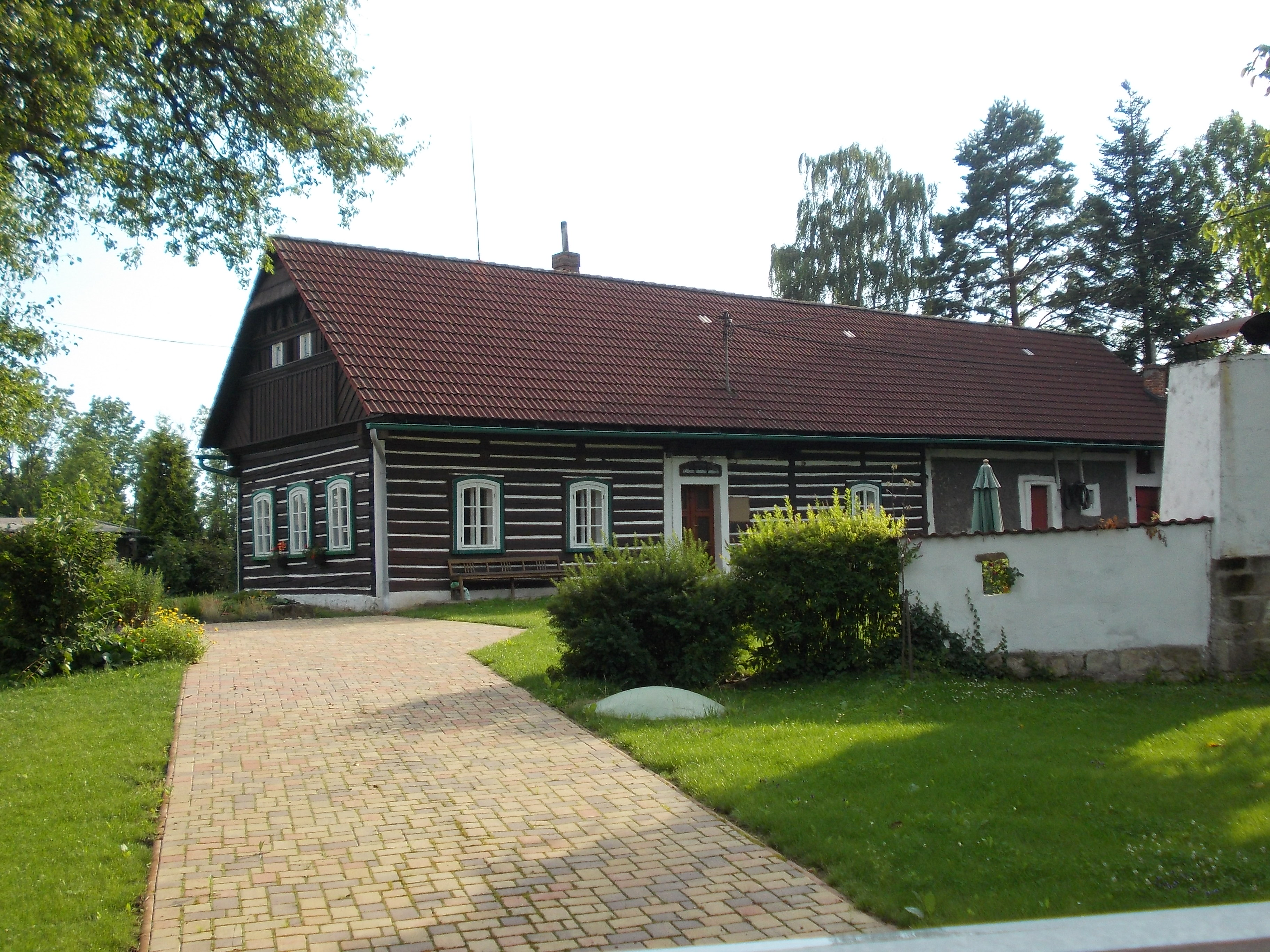 Kněžnice - dům č.p. 15